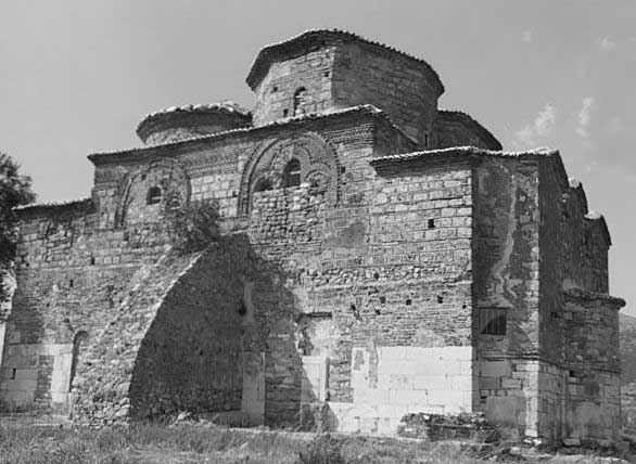 Orthodoxe Kirche St. Nikolaus in Mesopotam (Albanien), Zustand 1999